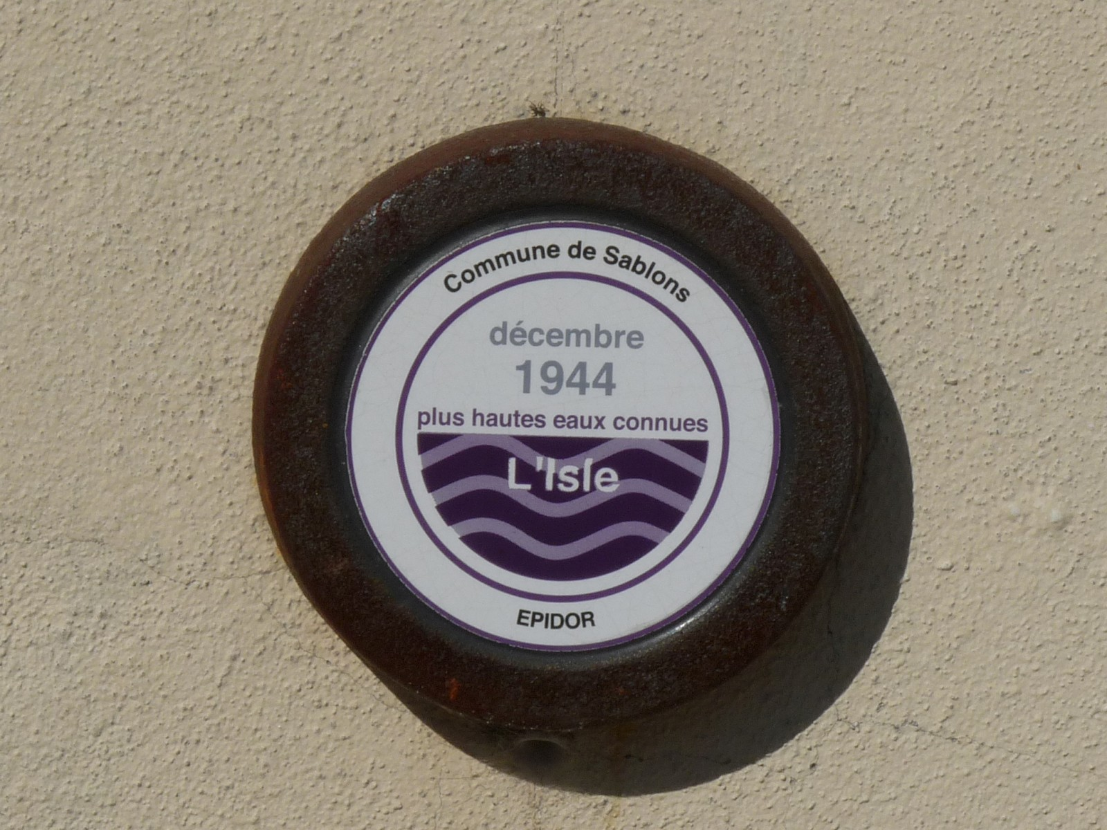 Repère de crue de l'Isle de 1944, mur de la salle des fêtes, mairie de Sablons, Gironde, France